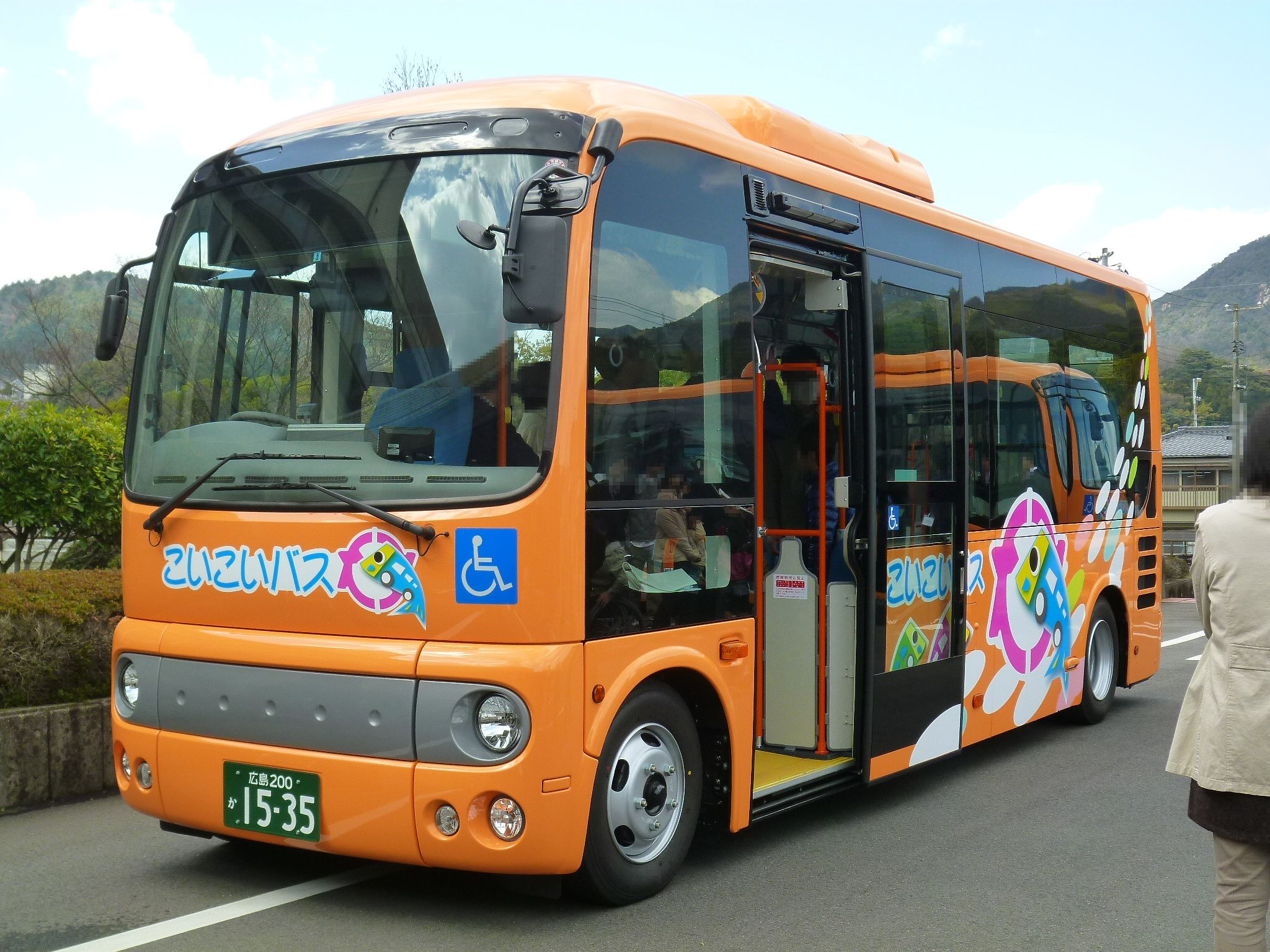 こいこいバス専用車両